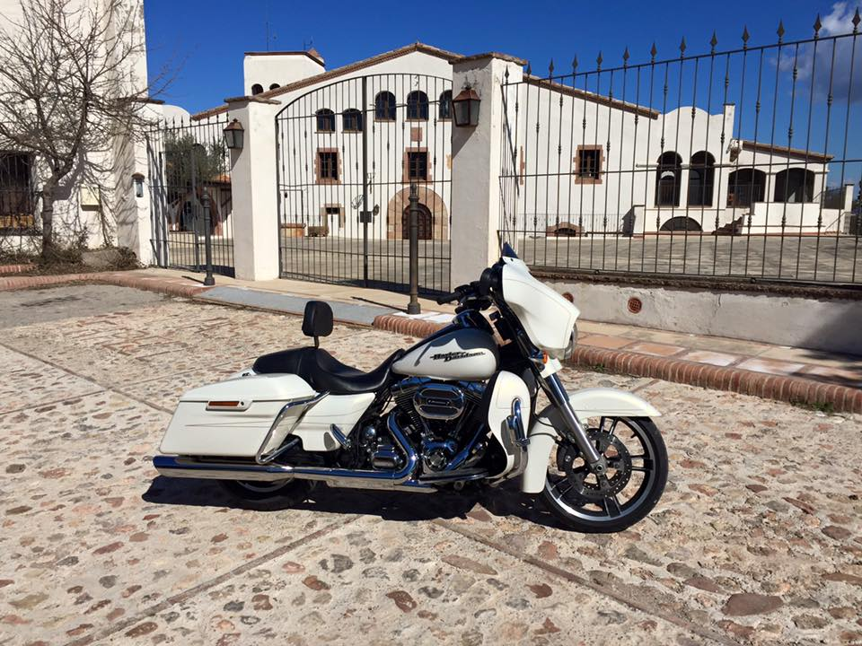 Harley Davidson Street Glide Special Modelo 2015